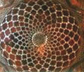 Cupula del Taj Mahal (interior) con pedrería incrustada